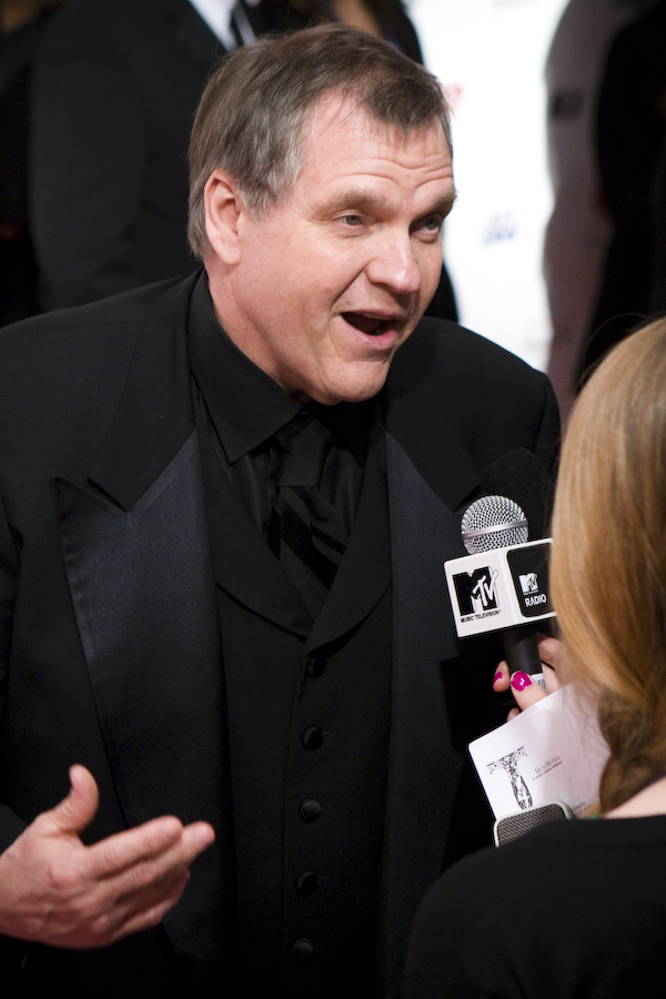 Meatloaf